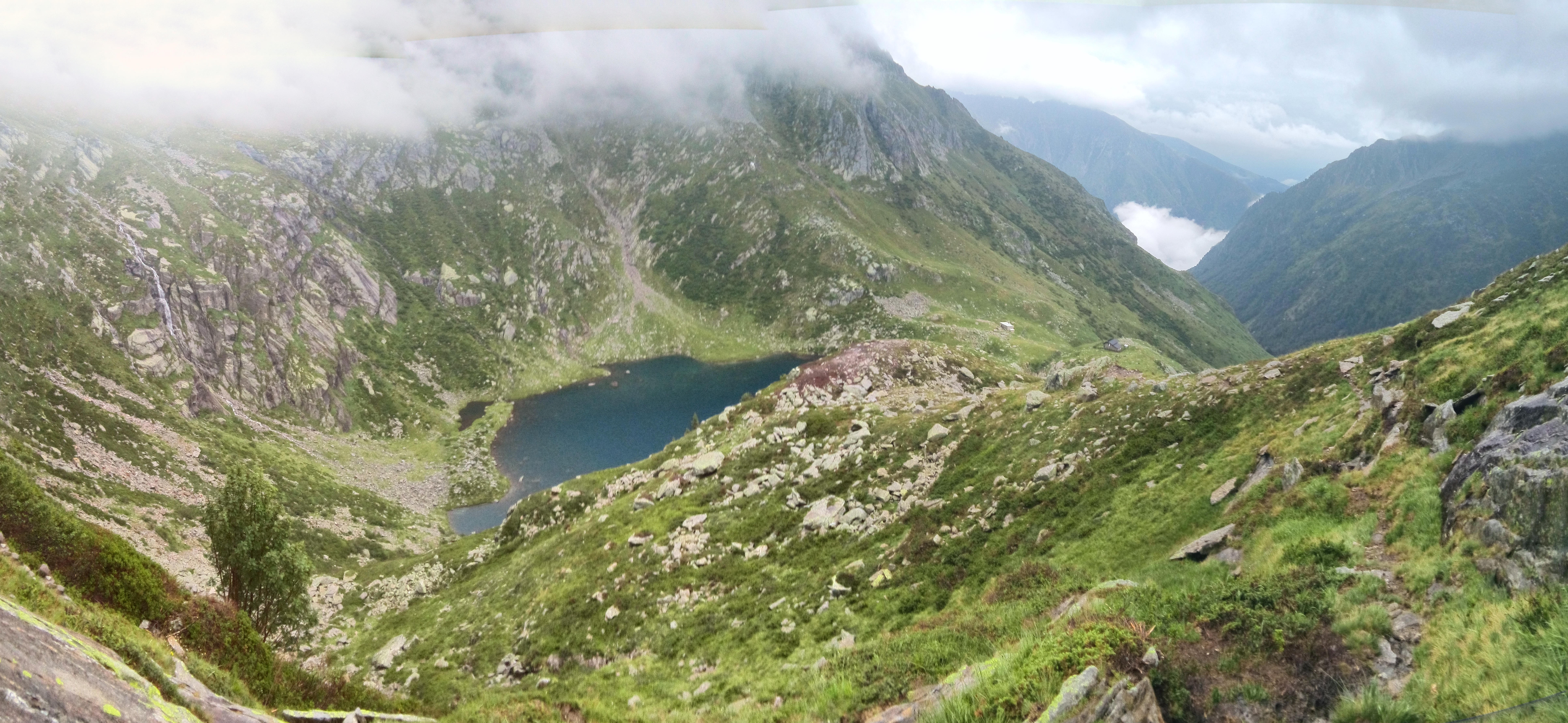 22010 Livo, Province of Como, Italy Lago di Darengo